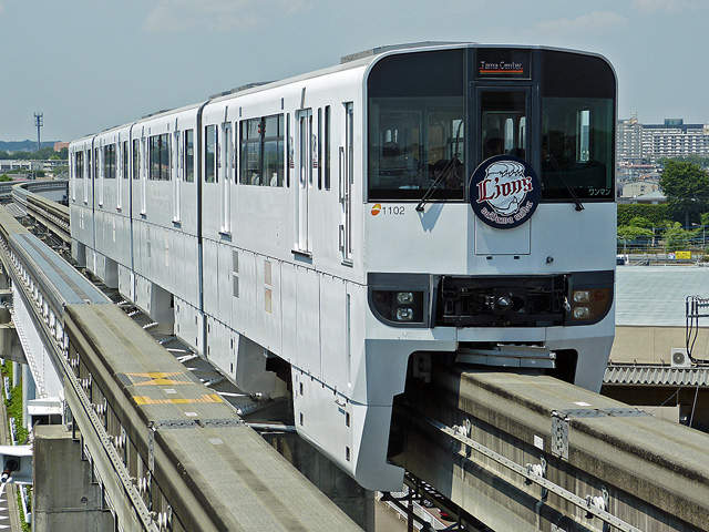 多摩都市モノレール1000系1102編成（砂川七番～泉体育館にて）